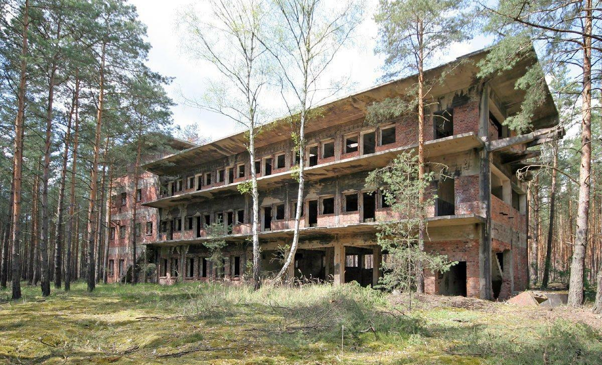 Hotelowiec w większej perspektywie. Zastanawiają szerokie galerie wzdłuż pięter. Może ktoś z oglądających to zdjęcie puści wodze fantazji na temat ich przeznaczenia?